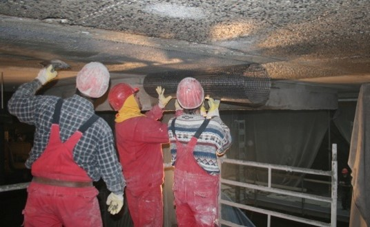 Neben dem Bereich des Denkmalschutzes wird Carbonbeton vor allem zur klassischen Verstärkung von Stahlbetongeschossdecken verwendet. Unter anderem wurden die Decken in einem neu errichteten Wohn- und Geschäftshaus in Prag verstärkt. Die punktgestützten Stahlbetonplatten sind 30 m × 70 m groß und haben eine Dicke von 23 cm. Die Decken zeigten Durchbiegungen von bis zu 15 cm und eine nicht ausreichende Tragfähigkeit. Die Verstärkung erfolgte mit Carbonbeton auf der Unterseite.